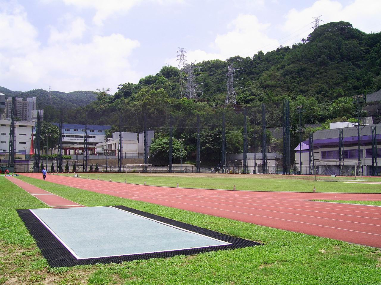 中文（香港）: 和宜合道運動場不合規格的跑道